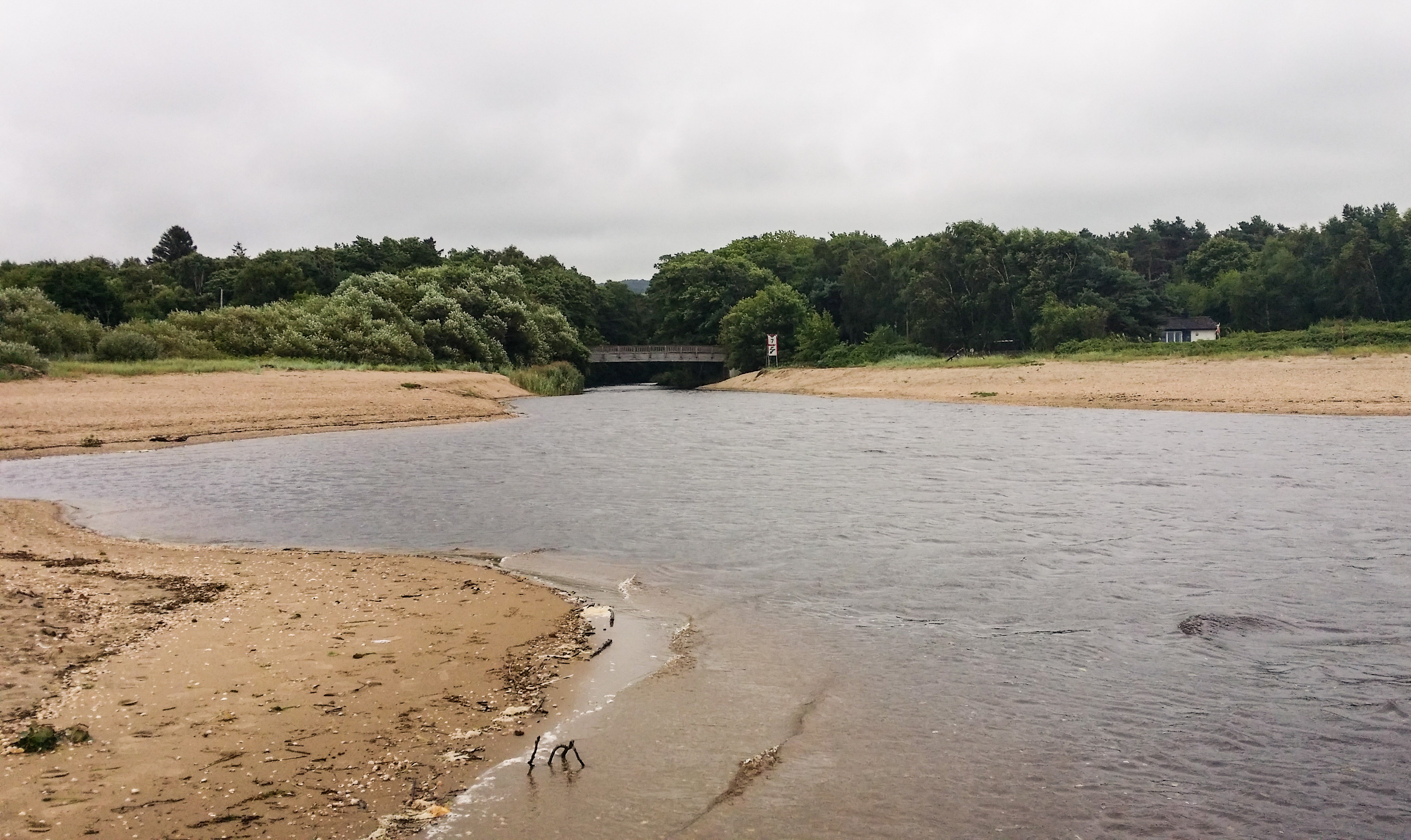 Stensåns mynning vid Hemmeslöv, Båstad, augusti 2014